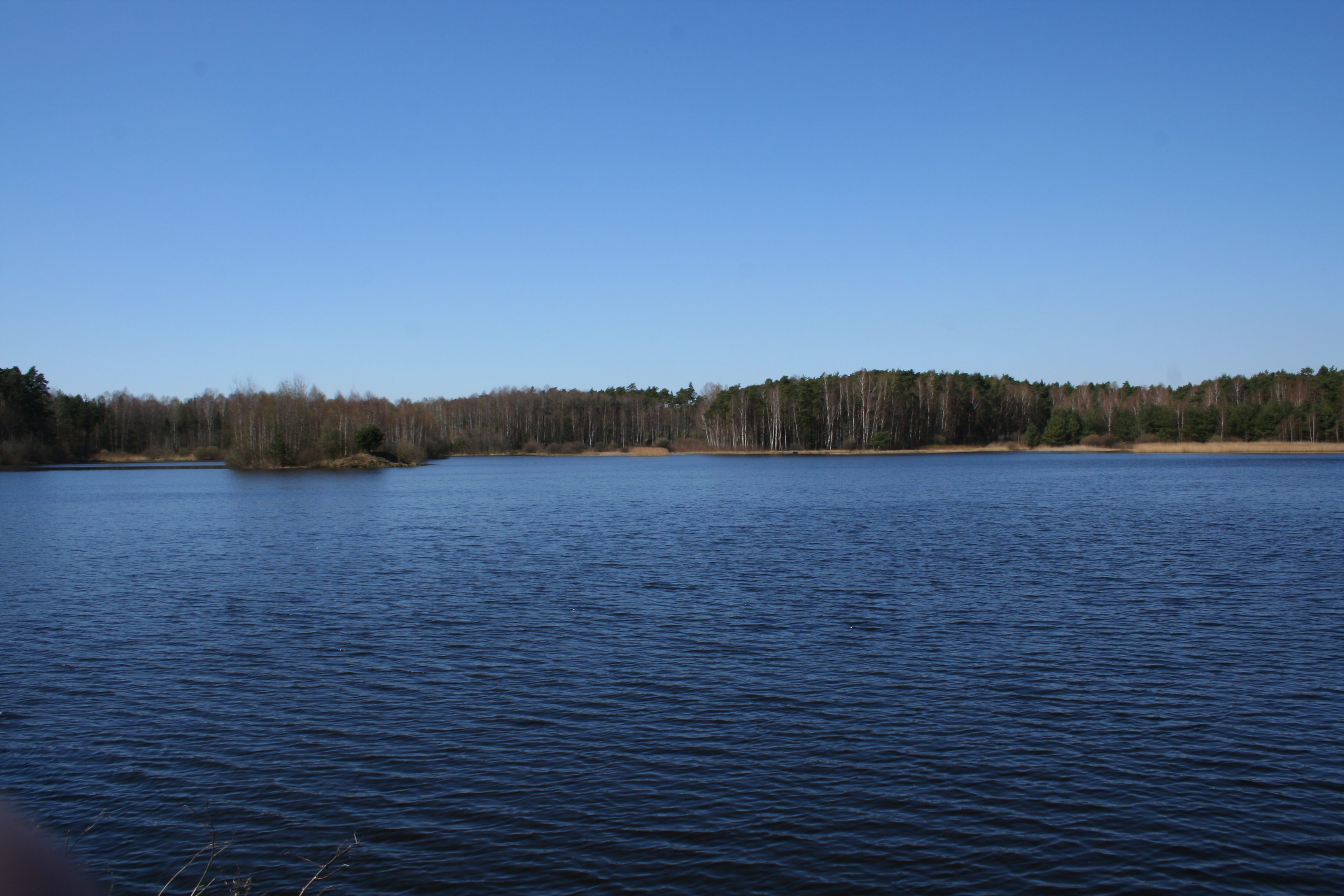 staw "Widawa" w okolicach miejscowości Kamienica, gmina Woźniki, powiat lubliniecki, województwo śląskie, stwa połozony jest na terenie leśnictwa Kamienica